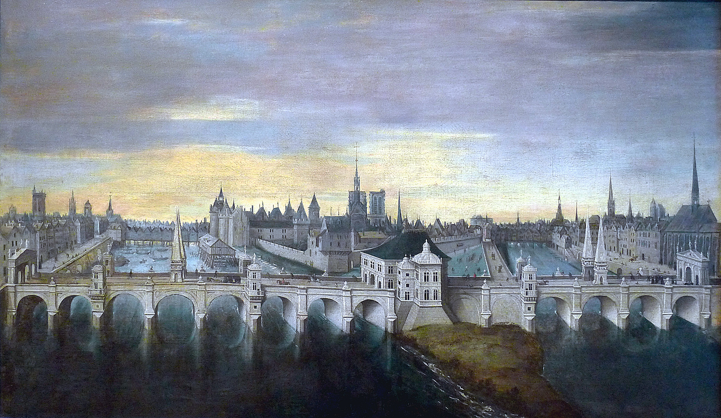 Tableau inspiré du dessin approuvé par Henri III en 1577 pour le Pont-Neuf, premier pont parisien conçu sans maisons. L'ouvrage final, terminé seulement en 1606 à la suite des troubles de la Ligue, s’inspire fortement de ce projet en suivant toutefois un parti décoratif plus simple.